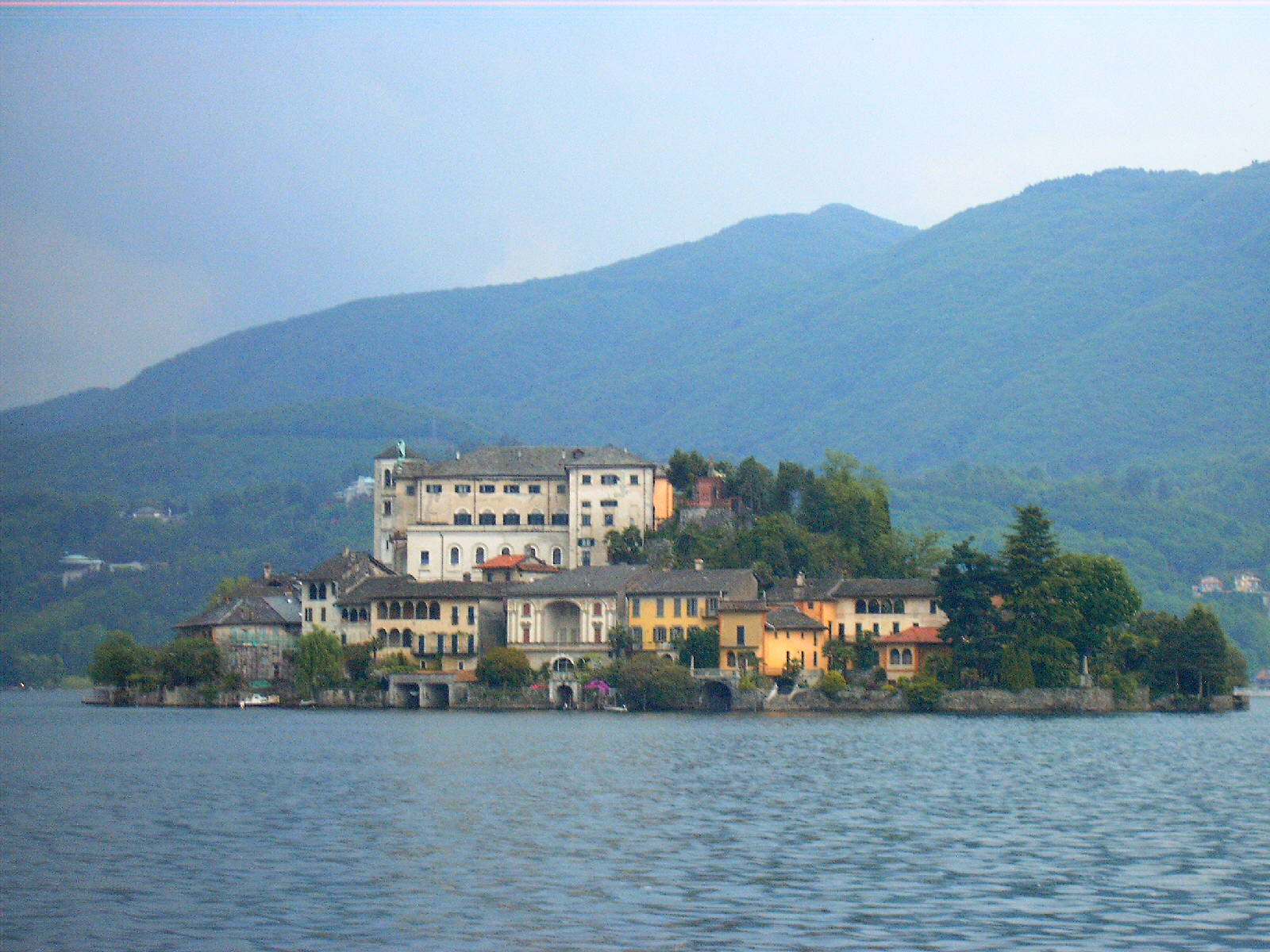 Isola San Giulio (Orta San Giulio, Italy)